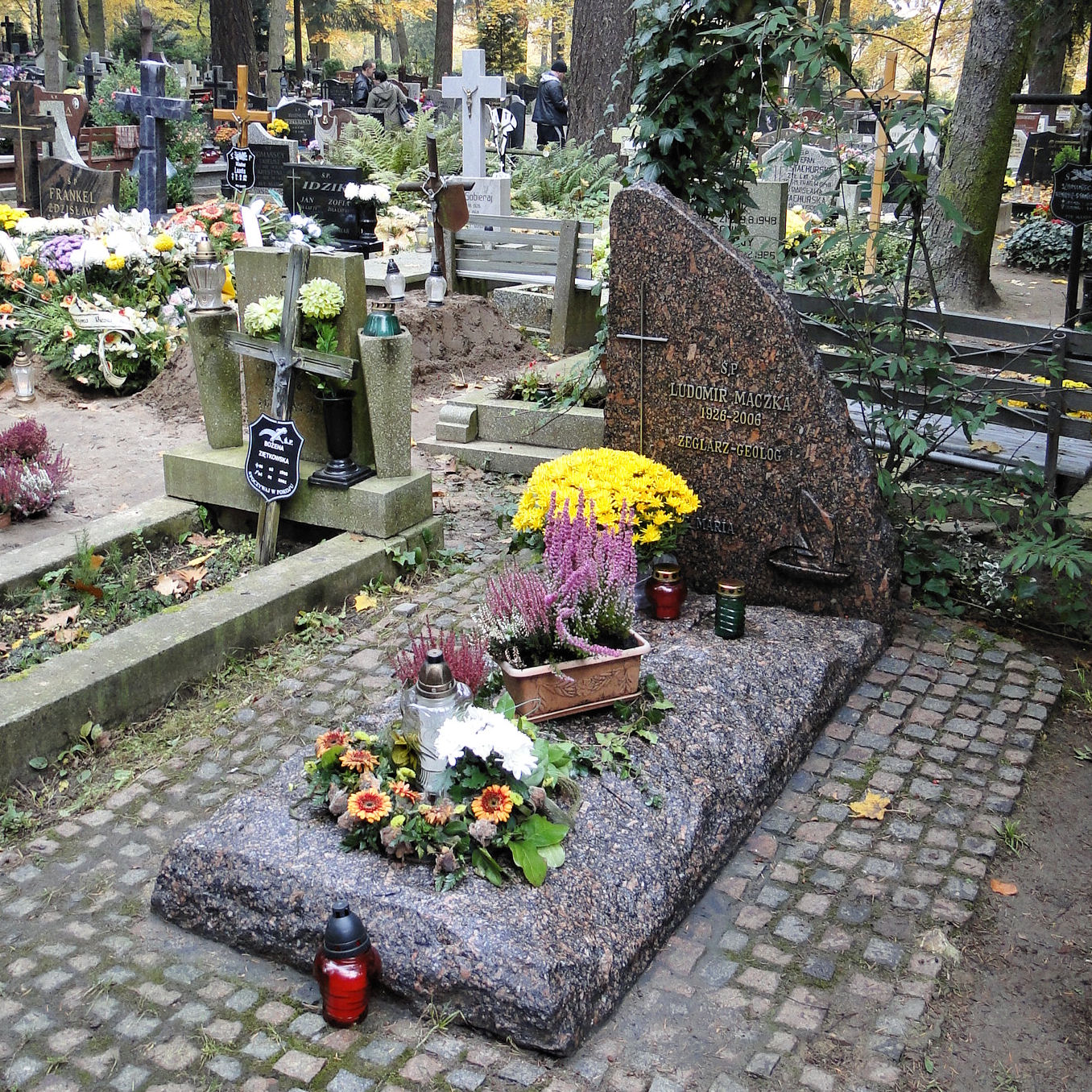 Nagrobek Ludomira Mączki na Cmentarzu Centralnym w Szczecinie